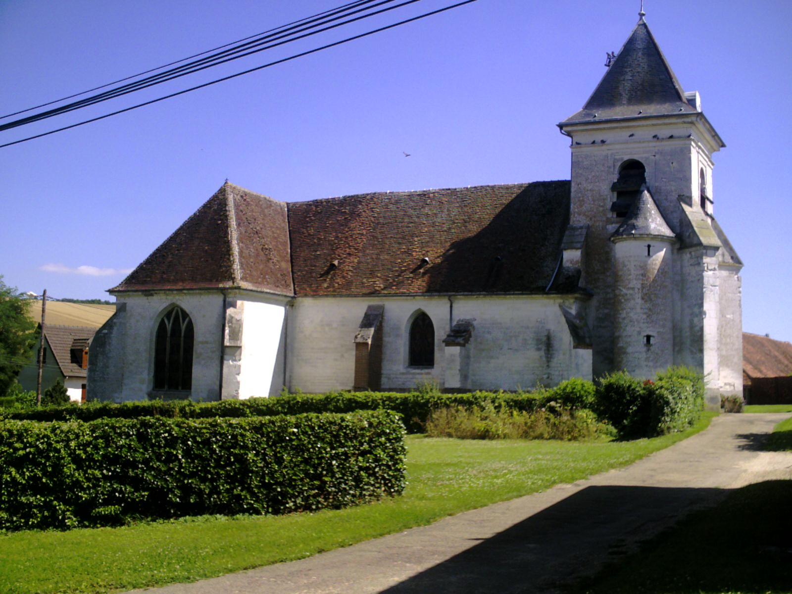 l'église